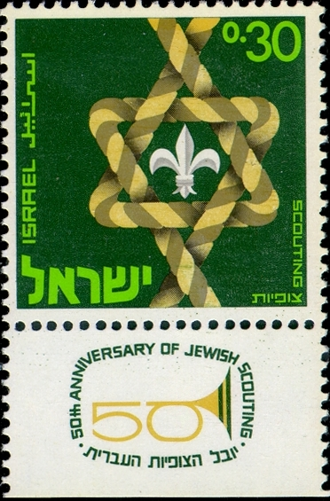 בול יובל לצופיות העברית